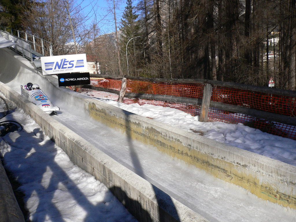 Coppa del mondo di bob a 4. L'equipaggio di Russia-1 sul rettilineo Antelao, pista eugenio monti di Cortina d'Ampezzo.